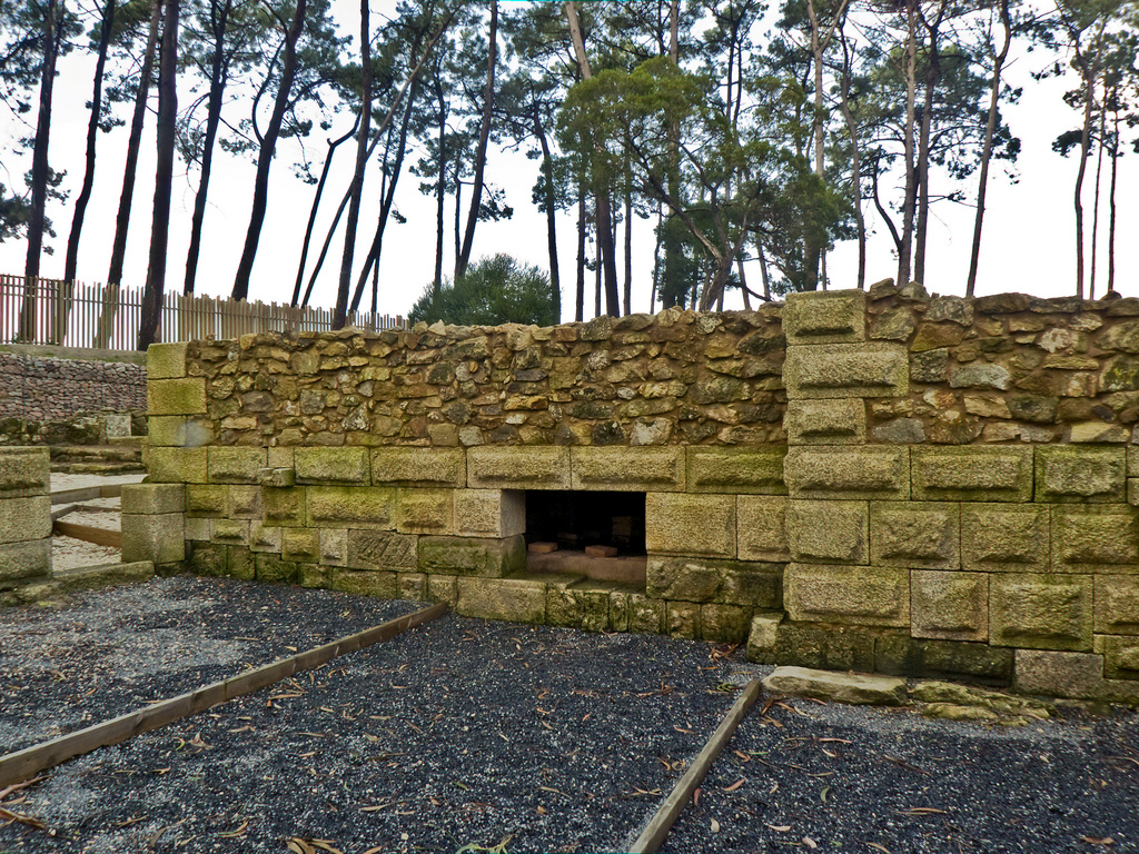 "O edificio principal, escavado e visitable na súa totalidade, encádrase perfectamente no modelo de villa lineal atlántica, caracterizado pola súa planta rectangular alongada, con pórtico e corredor lonxitudinal na fachada norte e ábsida sobresainte na fachada sur. O seu tamaño e considerable (580m2) sendo destacable que foi construido seguindo un plano preconcebido que emprega medidas e proporcións propias da arquitectura romana, rectángulo de 147 x 47 pés latinos, ou sexa, unha relación 3:1 exacta. No seu interior distínguense dúas áreas diferenciadas, unha residencial e de representación social asociada ó dominus, que ocupa a case totalidade da vivenda, e na que destacan unhas termas privadas, e outra de servicio asociada ós serventes e criados, moito mais pequena e restrinxida ó extremo occidental da casa. Ambas zonas son independentes, carentes de comunicación interior directa".